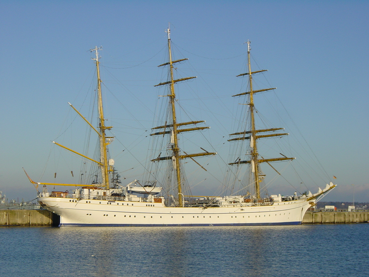 Gorch Fock (II) in Kiel